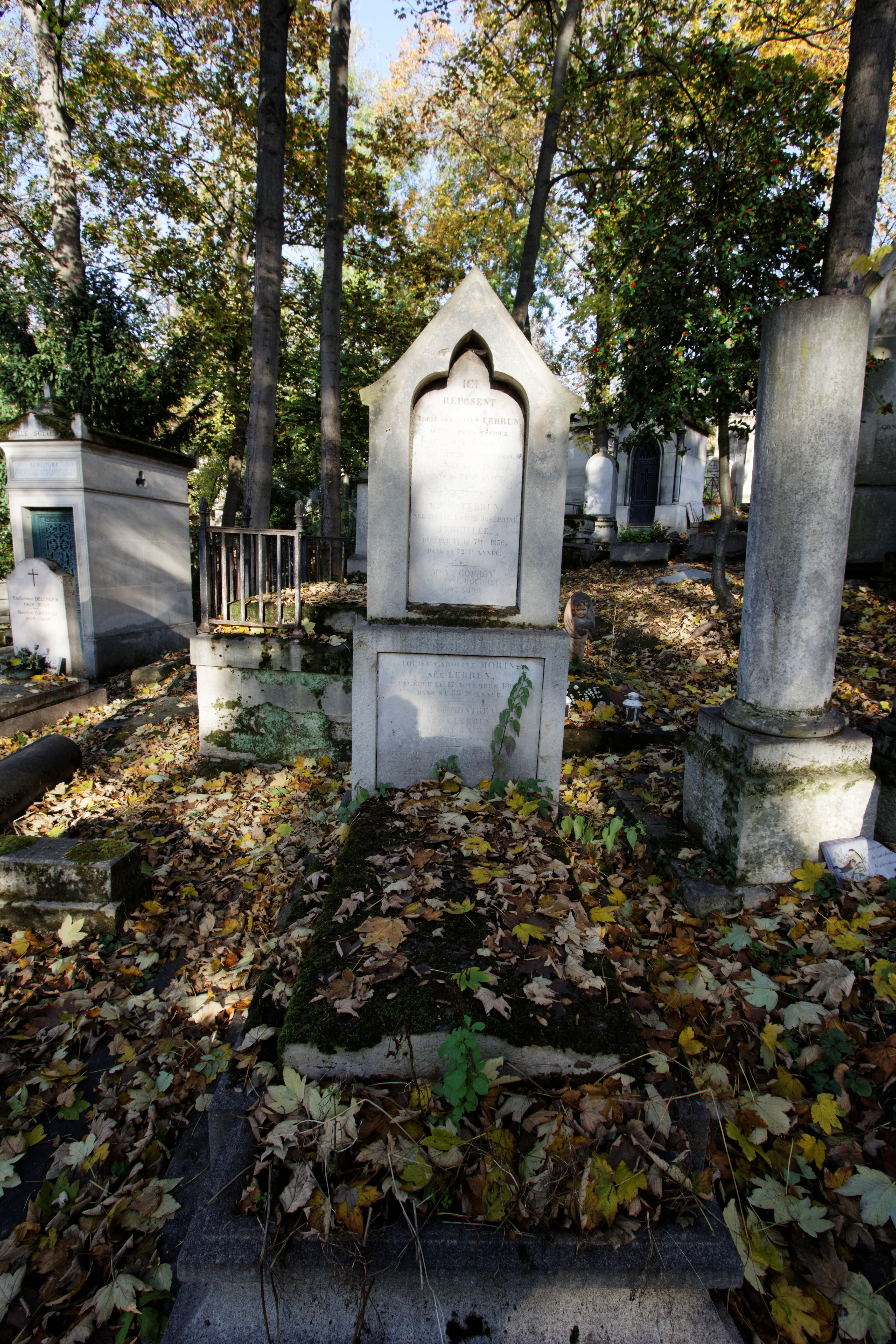 Sépulture de Louis-Sébastien Lebrun (1764-1829), ténor et compositeur ; Gustave-Alfred Tripels, peintre impressionniste.